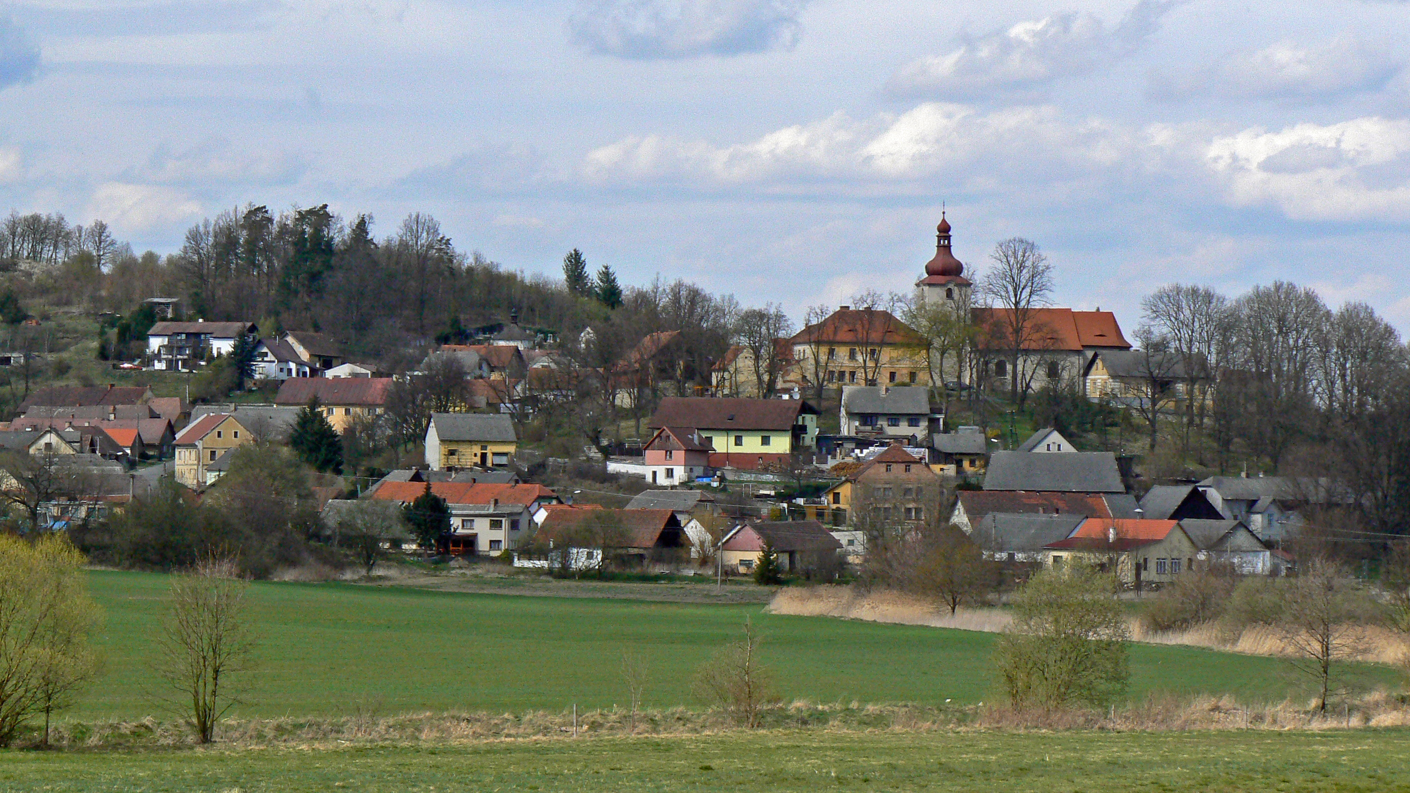 Obec Poleň